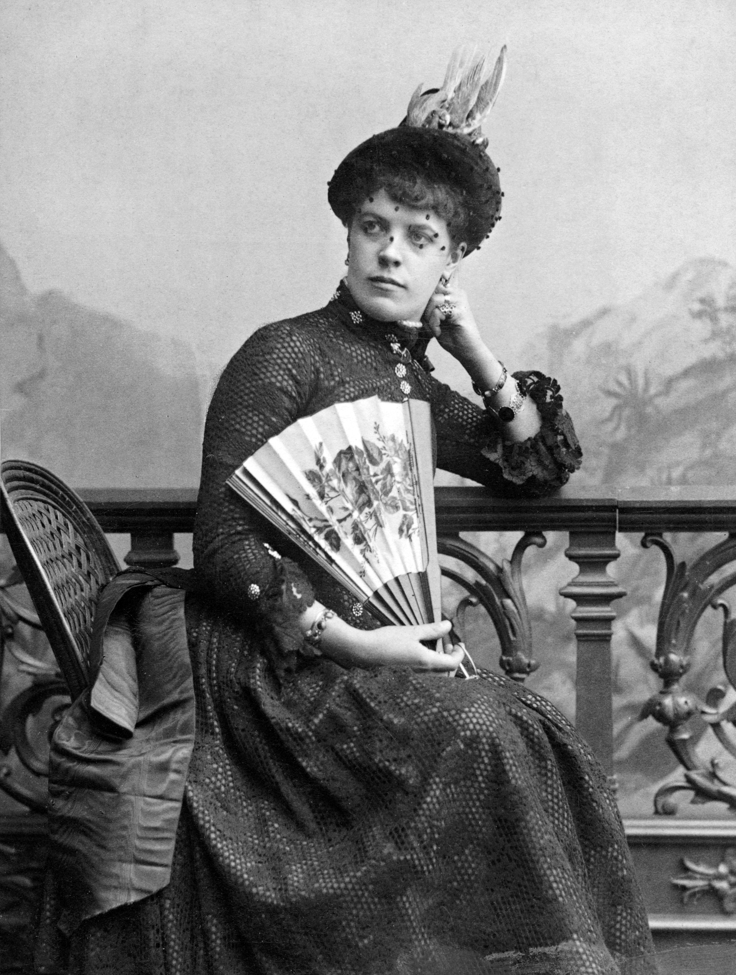 Zulamith Wellander, sångare vid Kungliga teatern (Operan) 1884